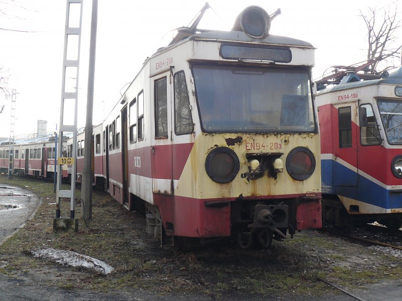 Elektryczne zespoły trakcyjne serii EN94 o numerach bocznych 20 i 29 w schemacie malowania z lat 90. oczekują na złomowanie na terenie szopy WKD. Jednostki te, pomimo wykonania napraw głównych w ZNTK Bydgoszcz w 1992, zostały odstawione w 2004 wraz z EN94-11 i 12 w związku z zakupem przez WKD zespołu EN95-01. Jednostki o numerach 11 i 12 zostały skasowane jeszcze w tym samym roku, zaś te na zdjęciu do kwietnia 2009 służyły jako magazyn części zamiennych dla innych EN94. Ostatecznie również je zezłomowano. Obok stoi EN94-19.